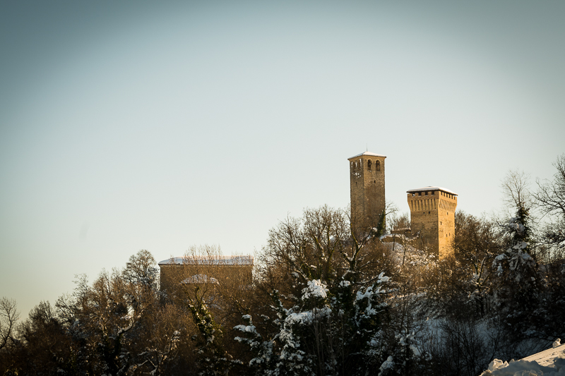 Castello di Sarzano This is a photo of a monument which is part of cultural heritage of Italy.